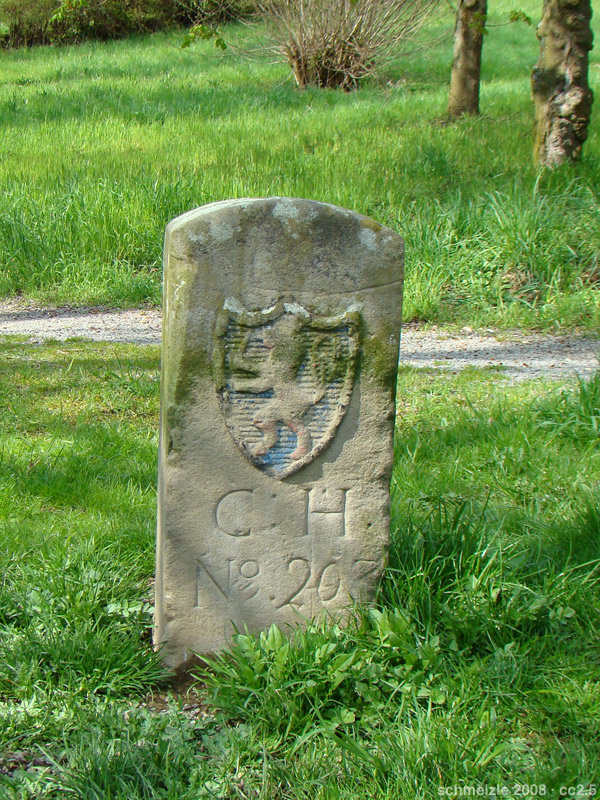 Grenzstein zwischen Baden und der ehemaligen hessischen Exklave in Zimmerhof, hessische Seite